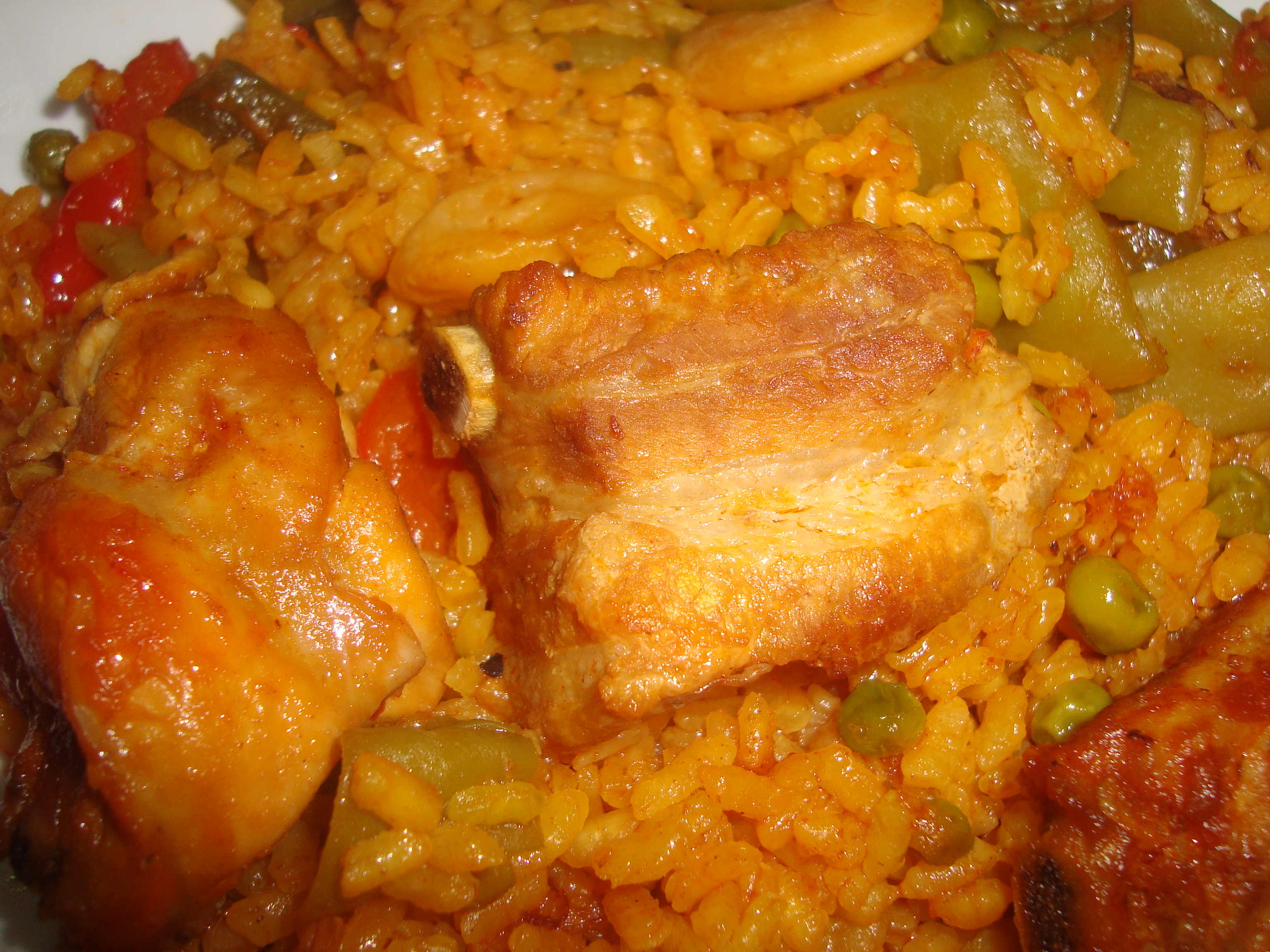 Plato de paella valenciana